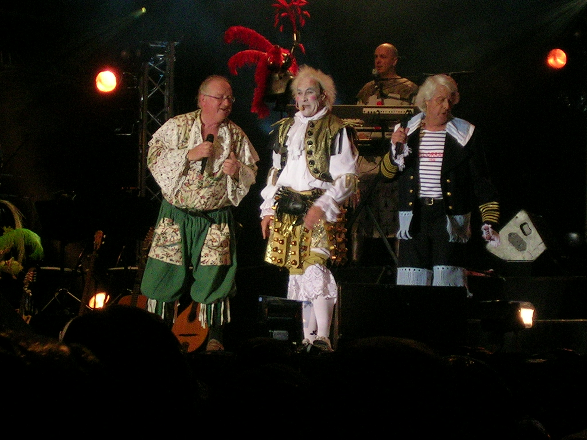 De gauche à droite : Jean Chocun, Jean-Louis Jossic et Jean-Paul Corbineau